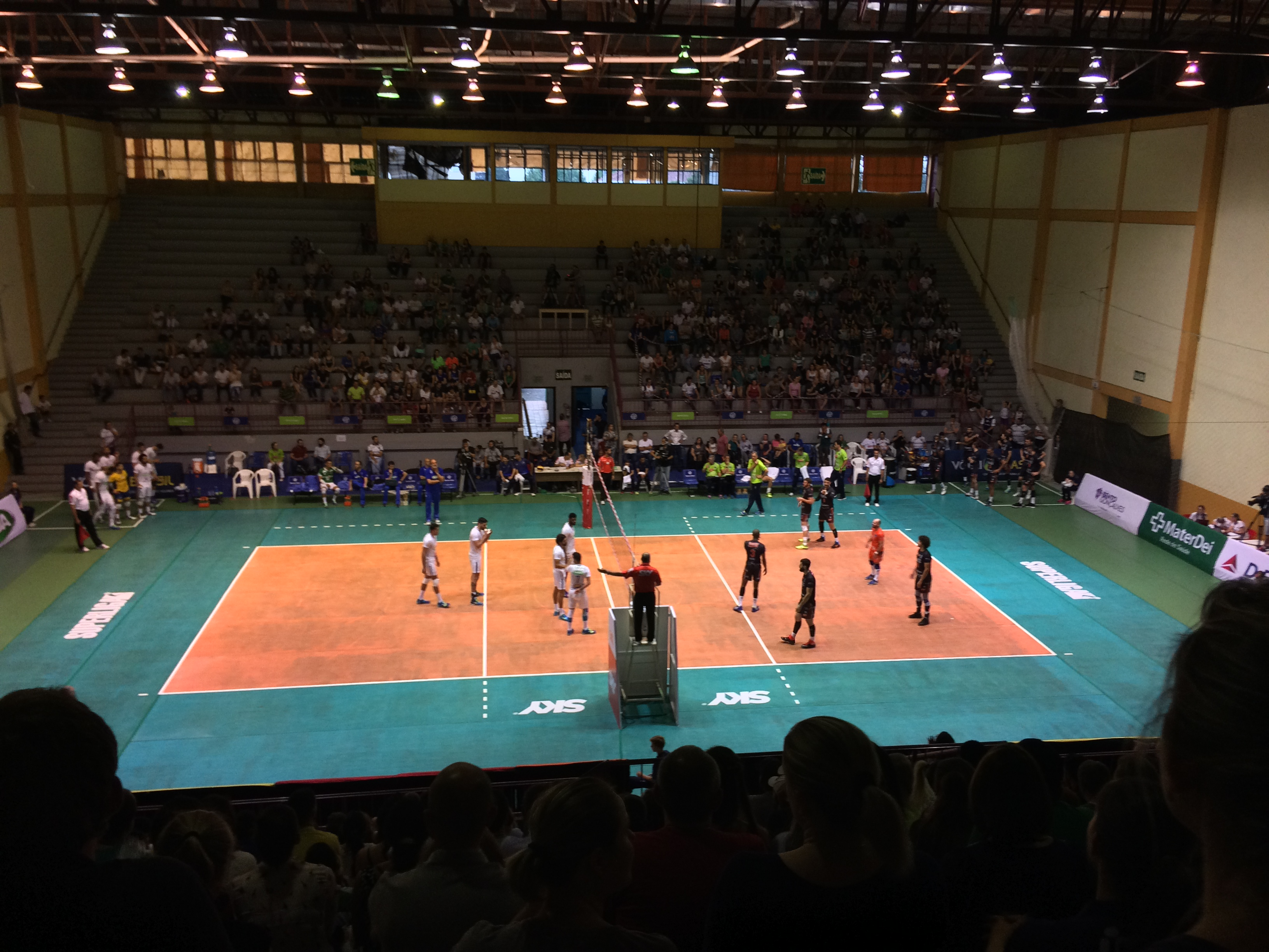 Partida entre Bento Vôlei e Sada Cruzeiro, válida pela Superliga 2016/2017